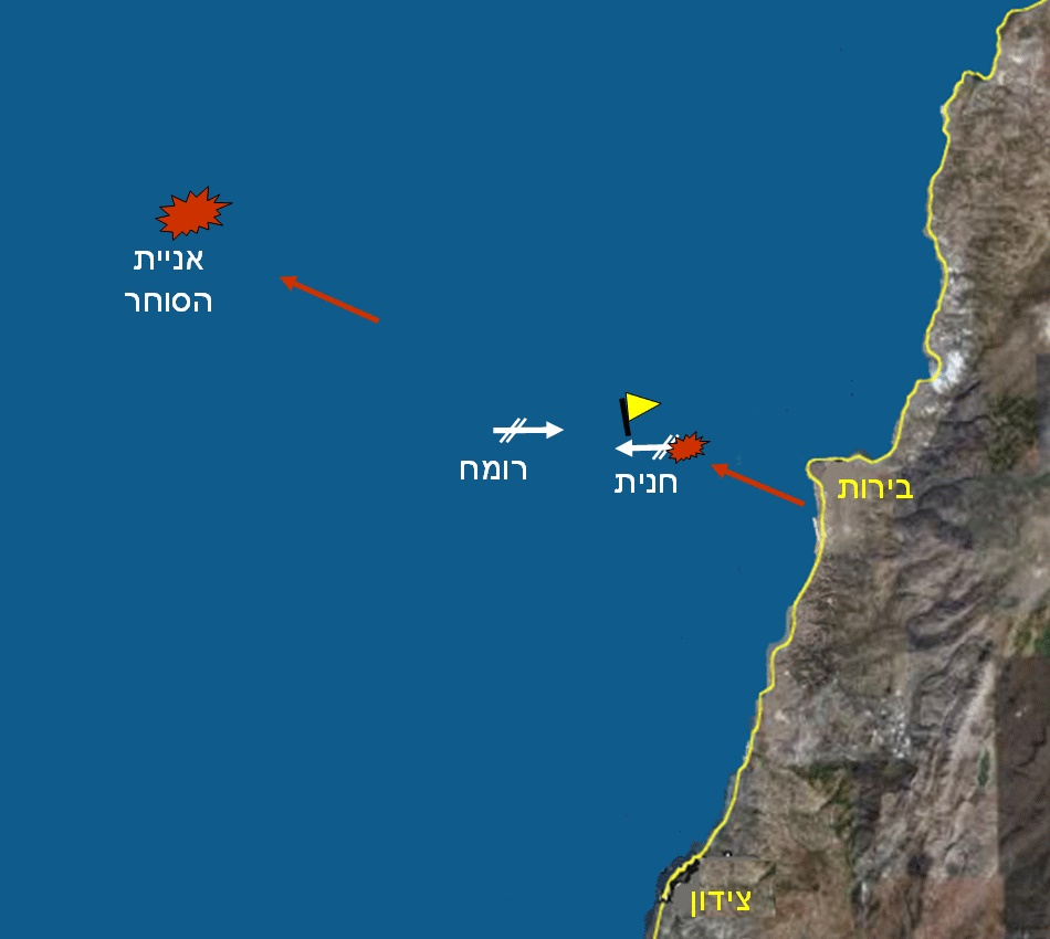 תרשים פריסת ספינות חיל הים בעת ירי טילים מהחוף 14 ביולי 2006.